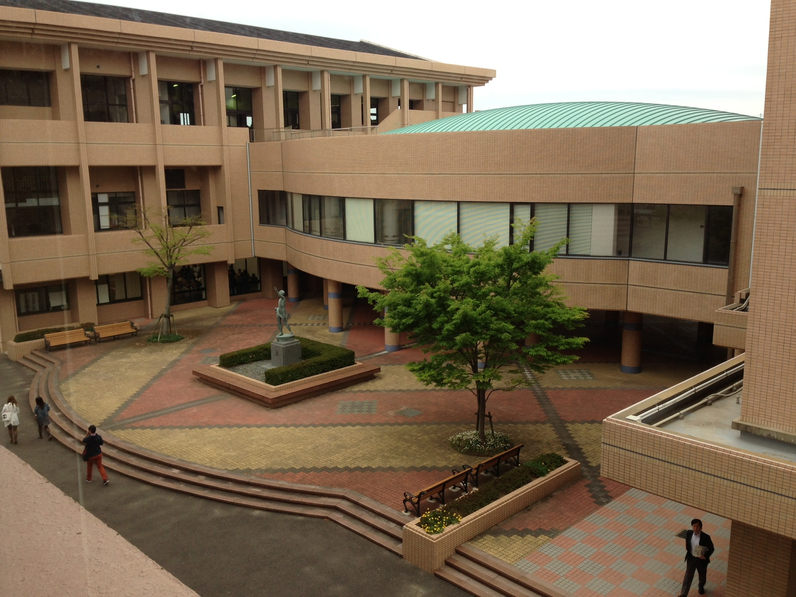 長崎県立大学佐世保校